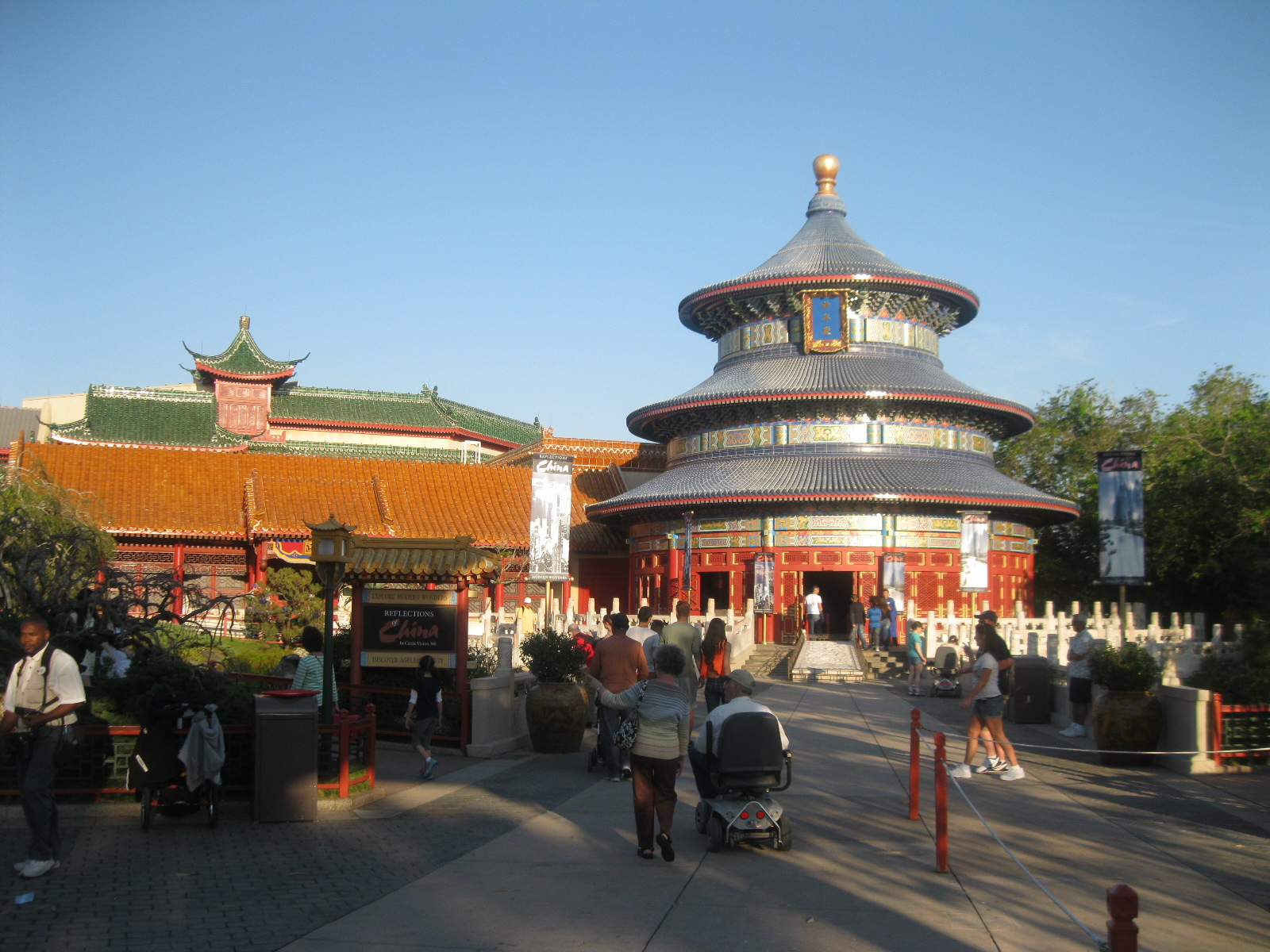 CHINA- EPCOT-DISNEY